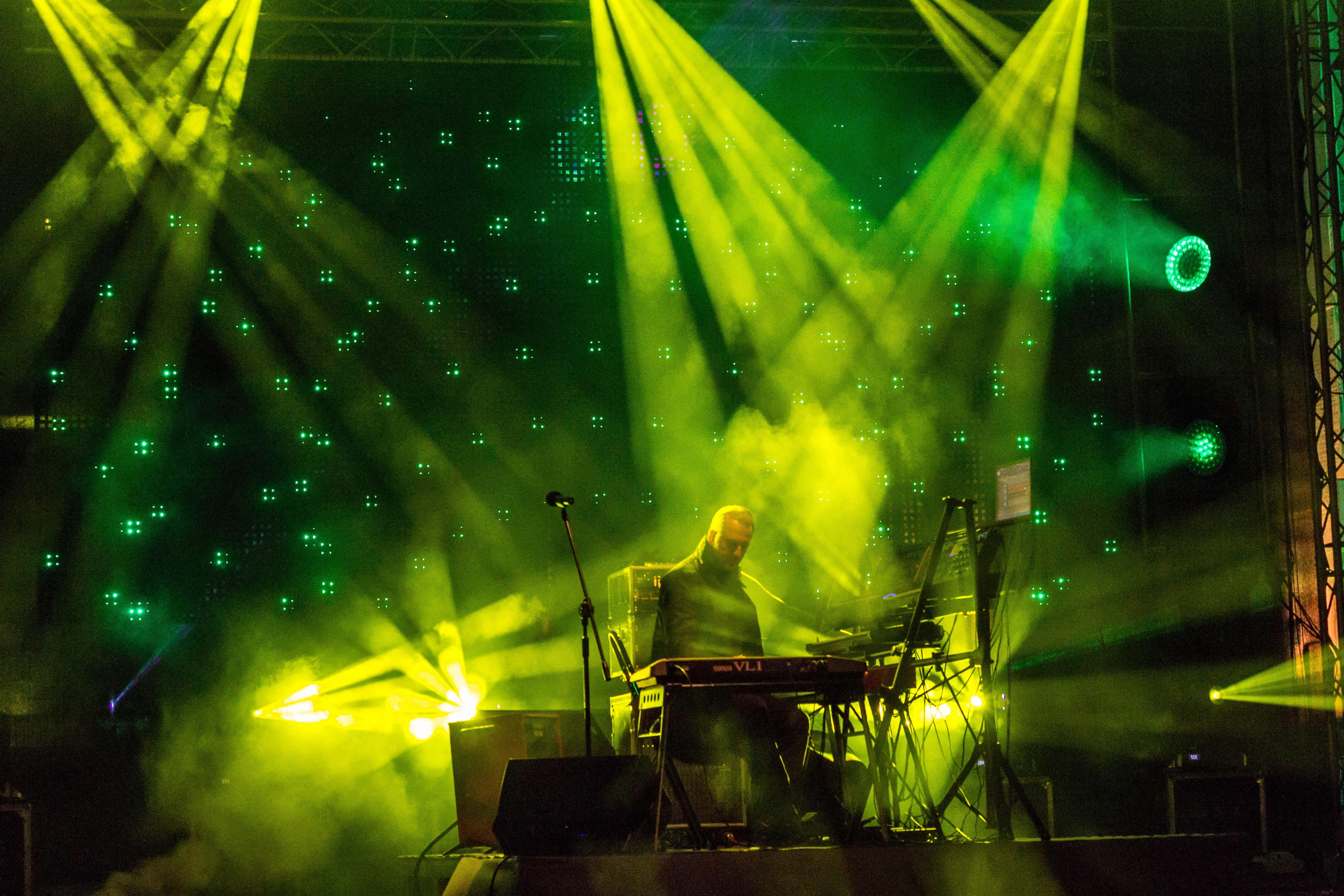 Koncert Marka Bilińskiego podczas I Królewskiego Festiwalu Światła 2013 w Warszawie (Wilanów)